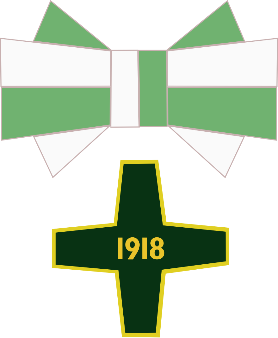 Орден "Освобождение Сибири", вариант награды за гражданские заслуги.